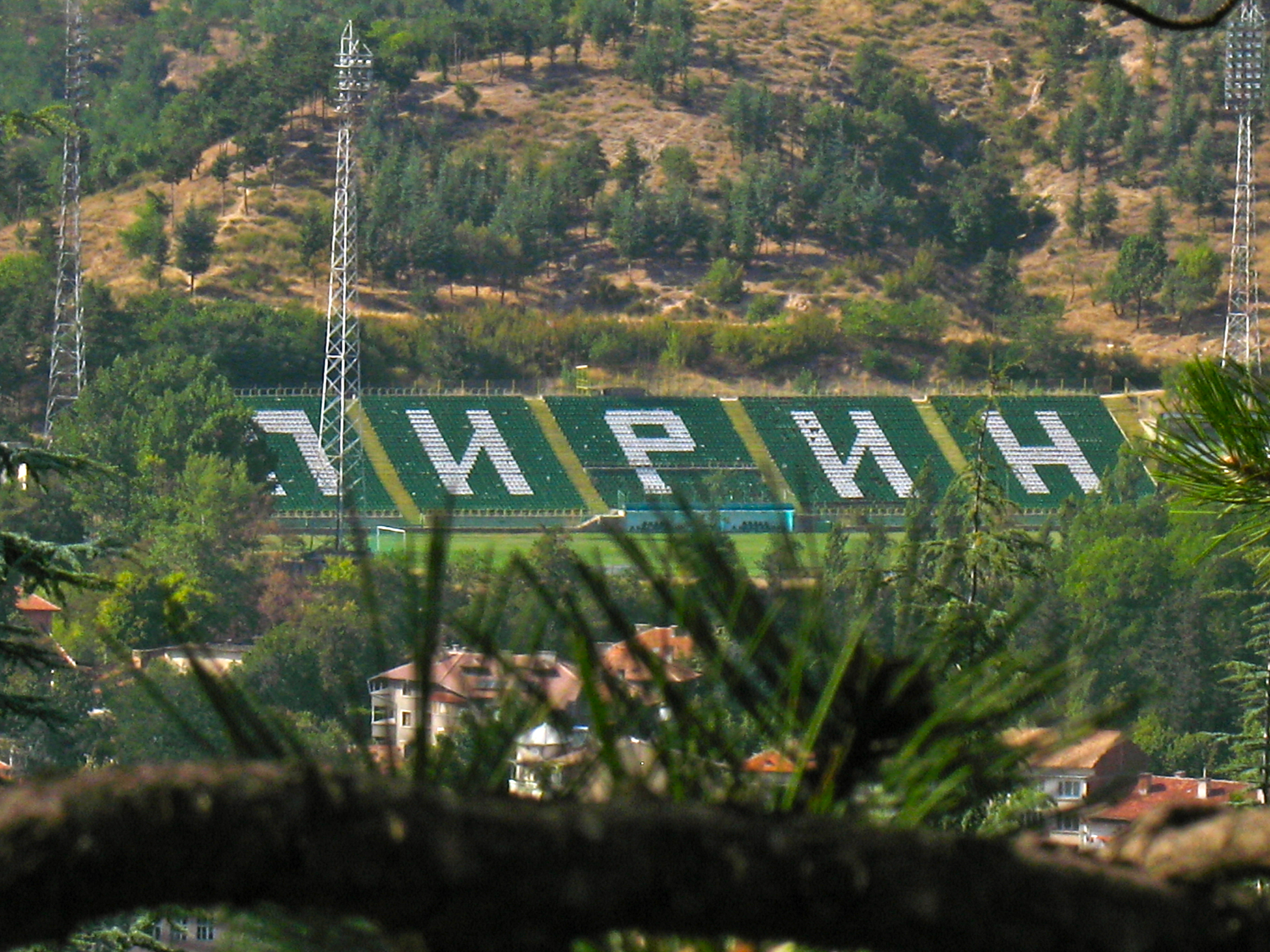 Стадион Христо Ботев в Благоевград.